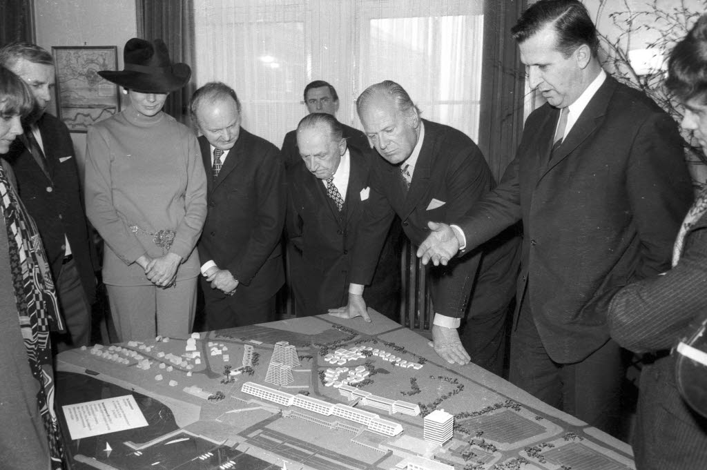 Zu einem Empfang anläßlich der Weltpremiere des Films "Ohrfeigen" von Rolf Thiele im Metro-Kino an der Holtenauer Straße. V.l. Gila von Weitershausen, Hannes Leidemer, Leiter des Olympiareferats der Stadt, Simone Jürgens, Regisseur Rolf Thiele, Produzent Herbert Maris (vermutlich), Curd Jürgens, Oberbürgermeister Günther Bantzer und Werner Pochath vor einem Modell des Olympiazentrums in Schilksee.